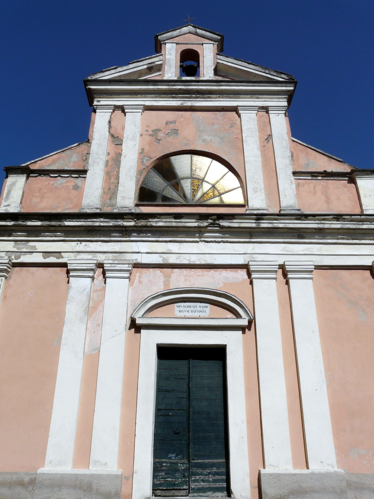 L'oratorio di San Giovanni Battista, Crocefieschi, Liguria, Italia